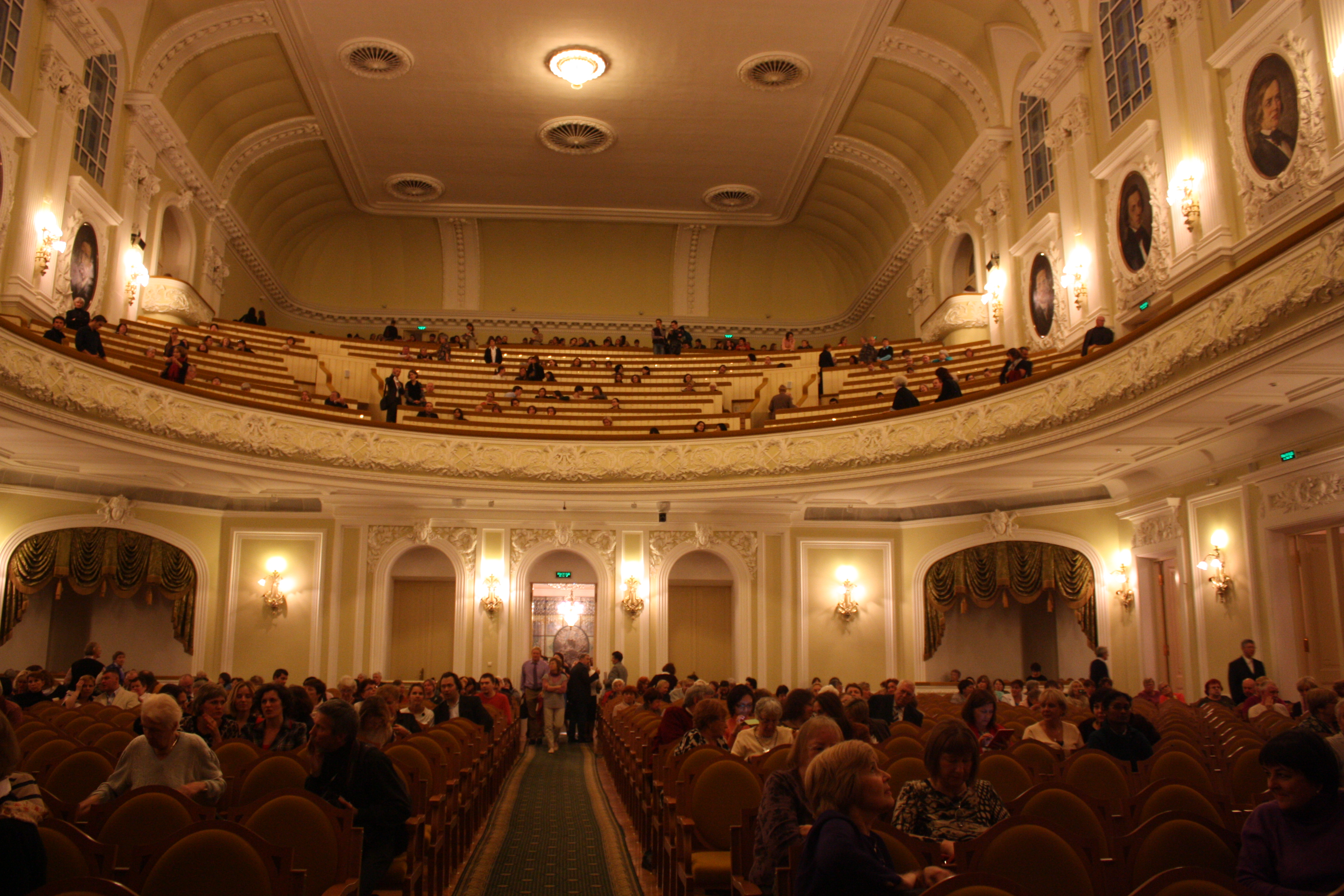 Здание Московской консерватории (Москва и Московская область, Москва, Большая Никитская улица, 13)